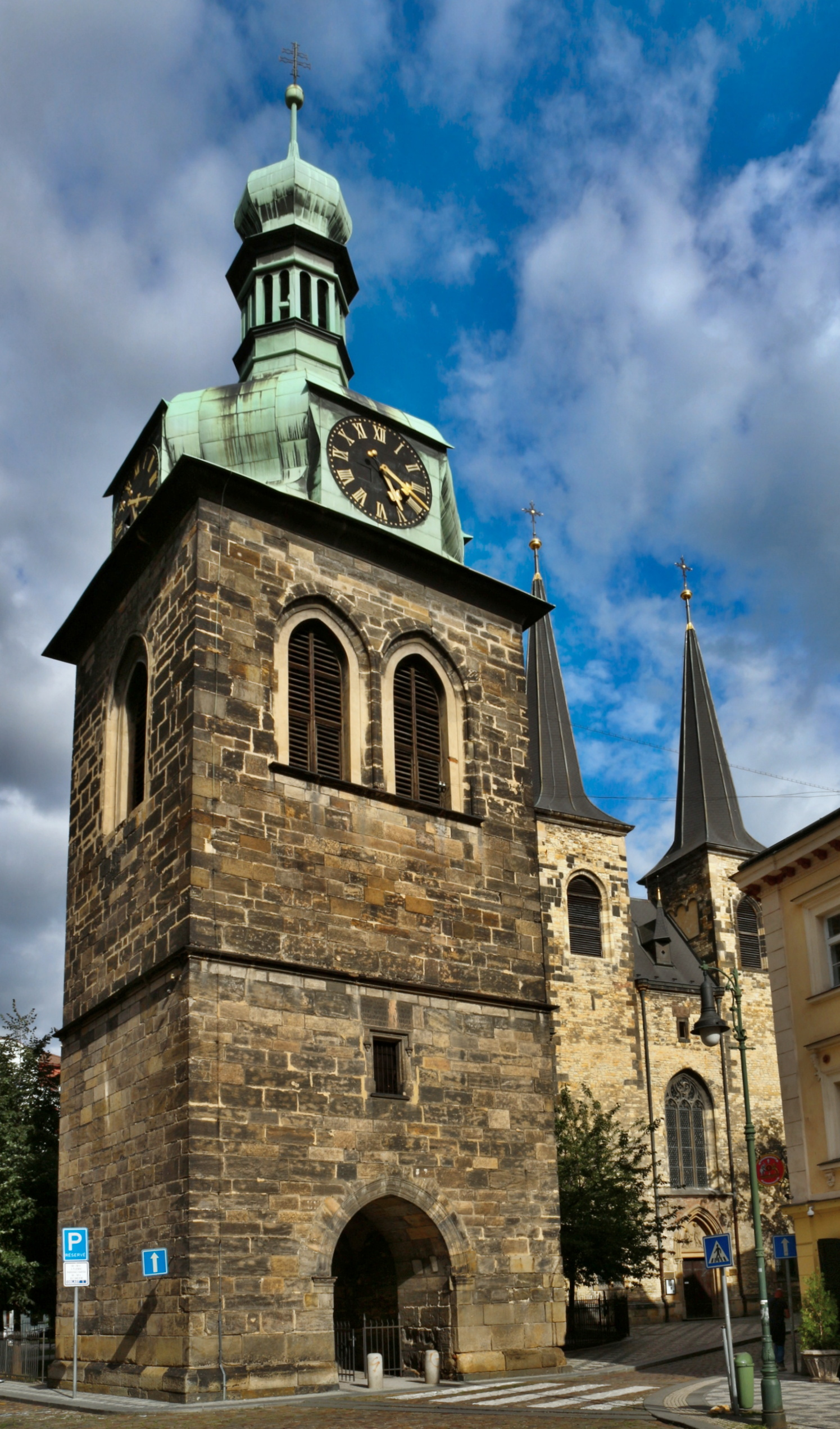 Kostel svatého Petra Na Poříčí